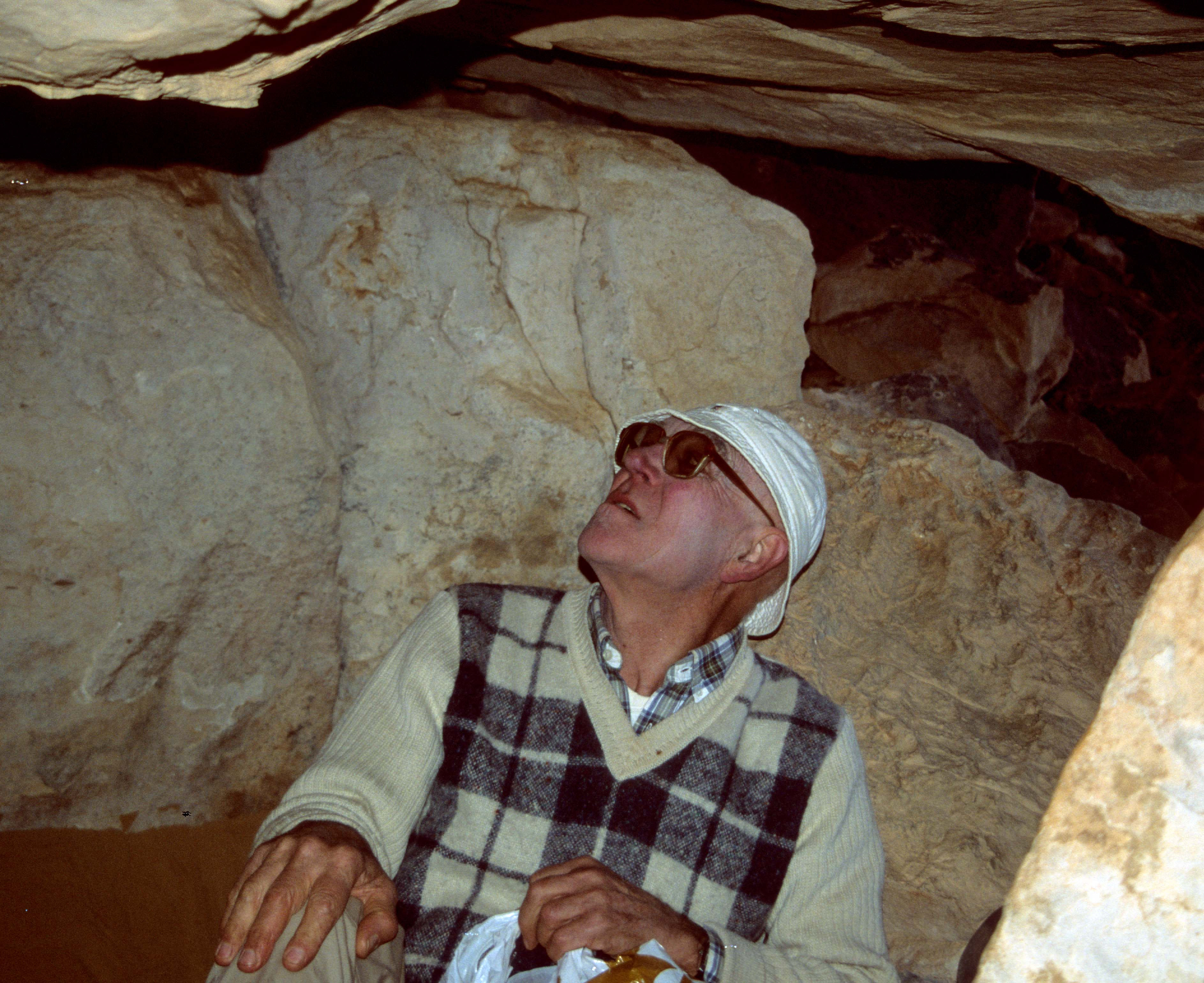 Alfred Muzzolini examinant des peintures rupestres dans le massif des Aramat en 2000.